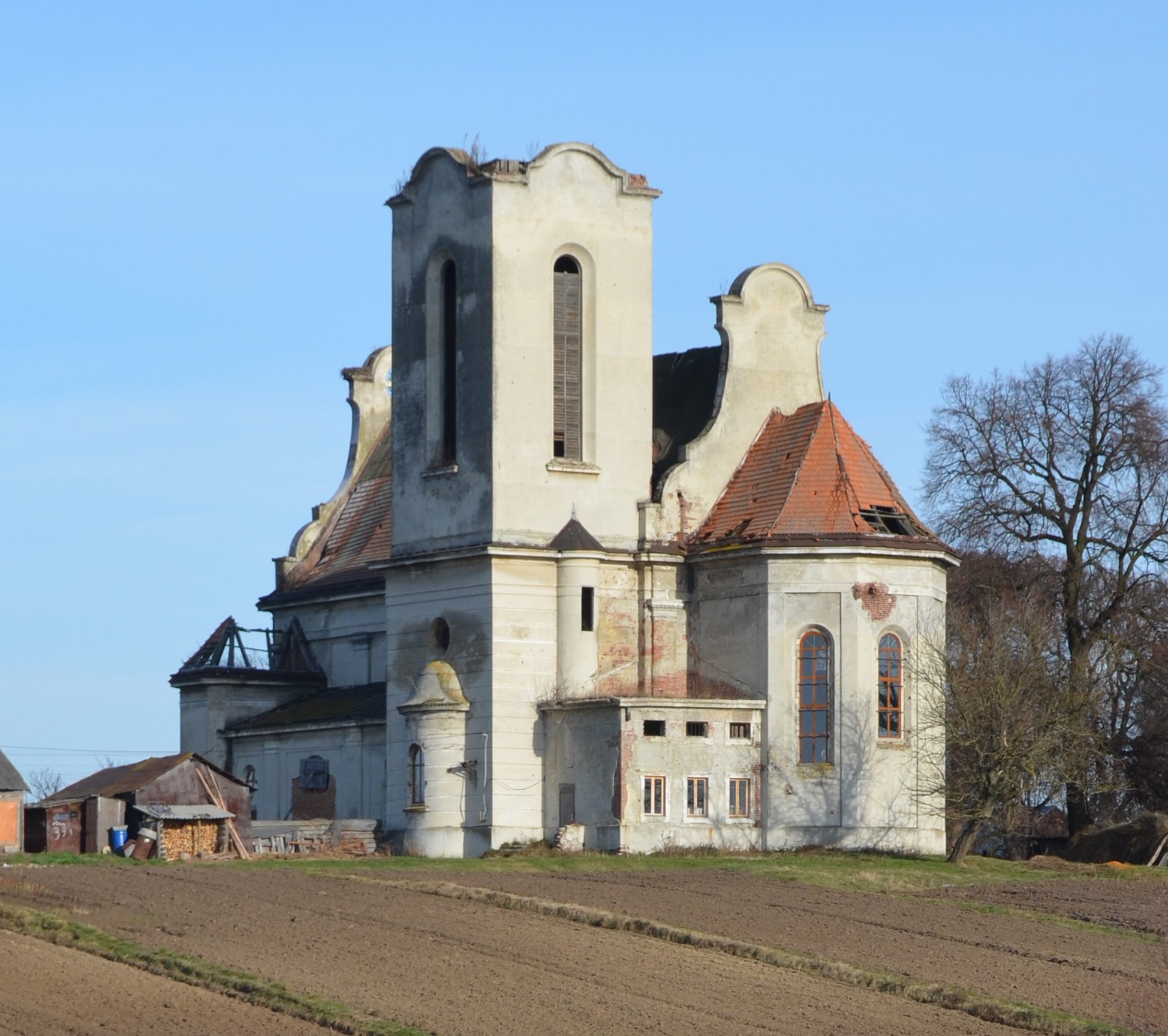 Костел у селі Велике Колодно Кам'янко-Бузького району. Архітектор Альфред Броневський (1869—1941).